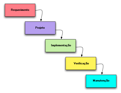 waterfall model